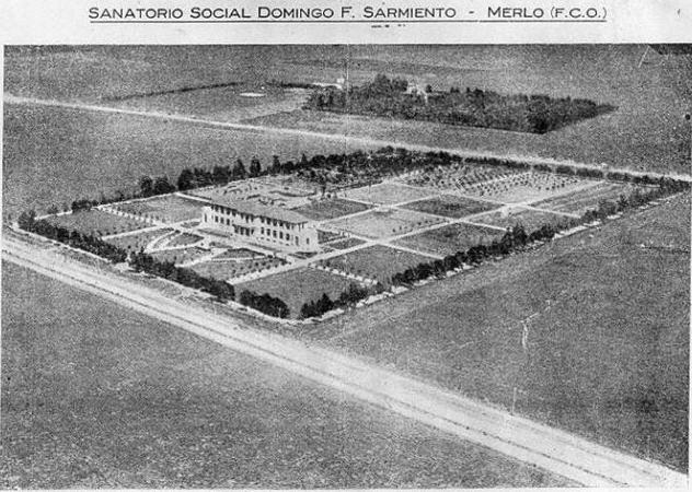 Sanatorio para tuberculosos, Merlo.